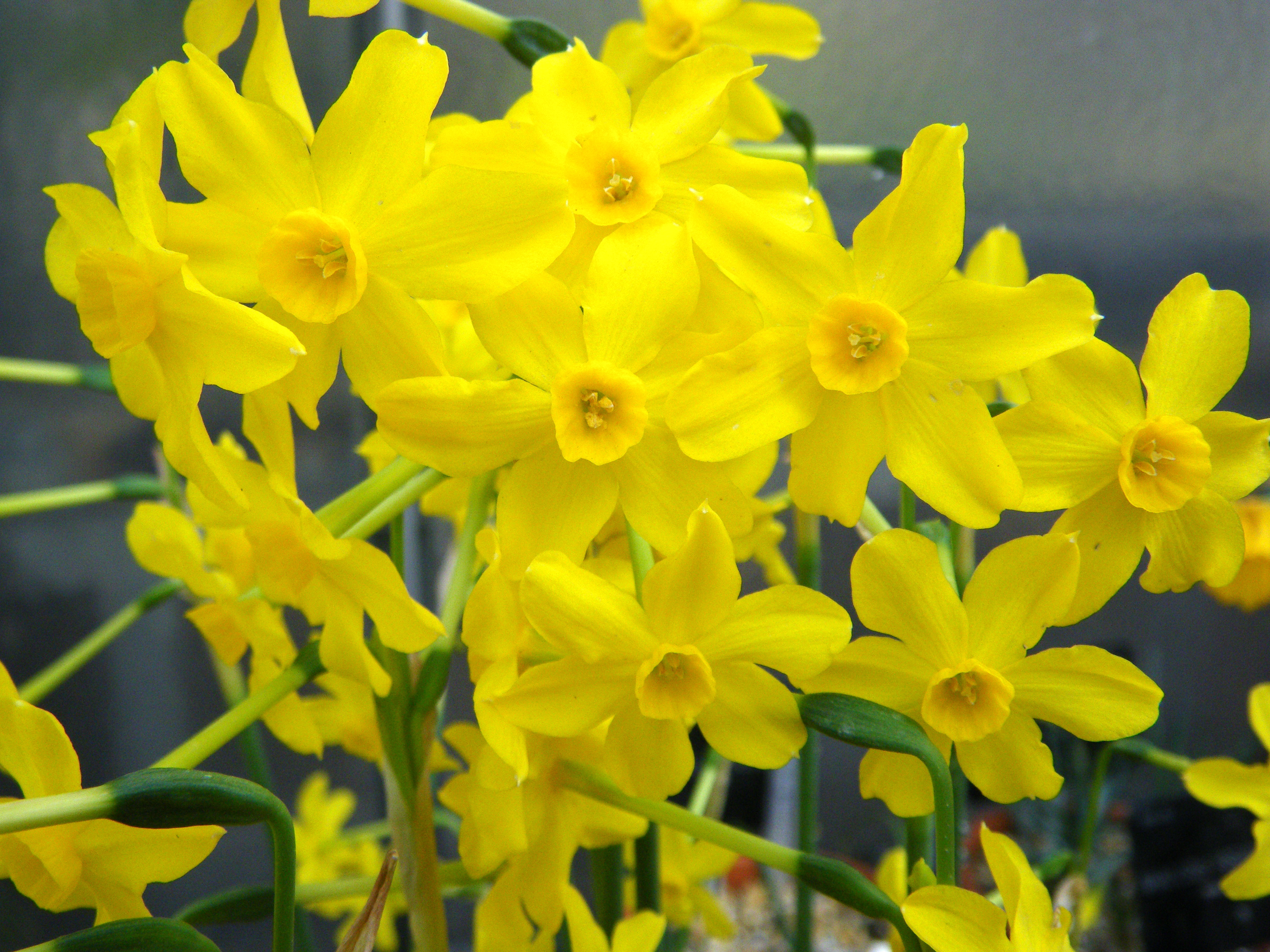 Narcissus jonquilla L. Real Jardín Botánico, Madrid, España.